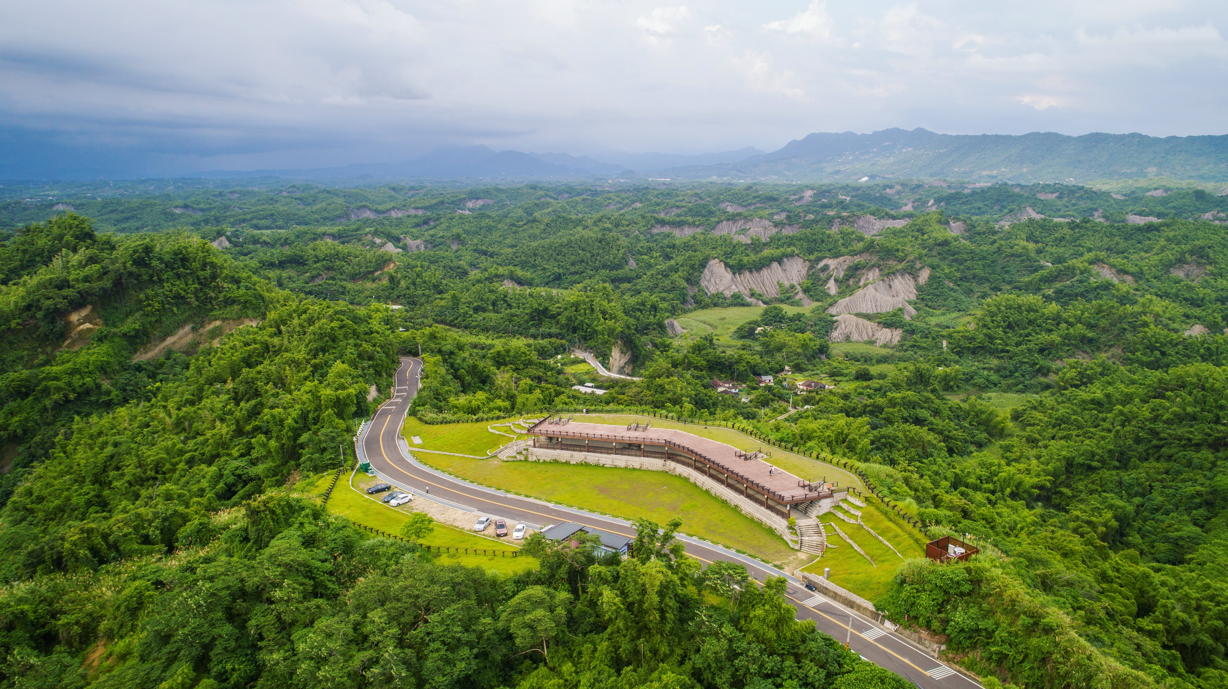 中文（台灣）: 台南左鎮區二寮觀日亭